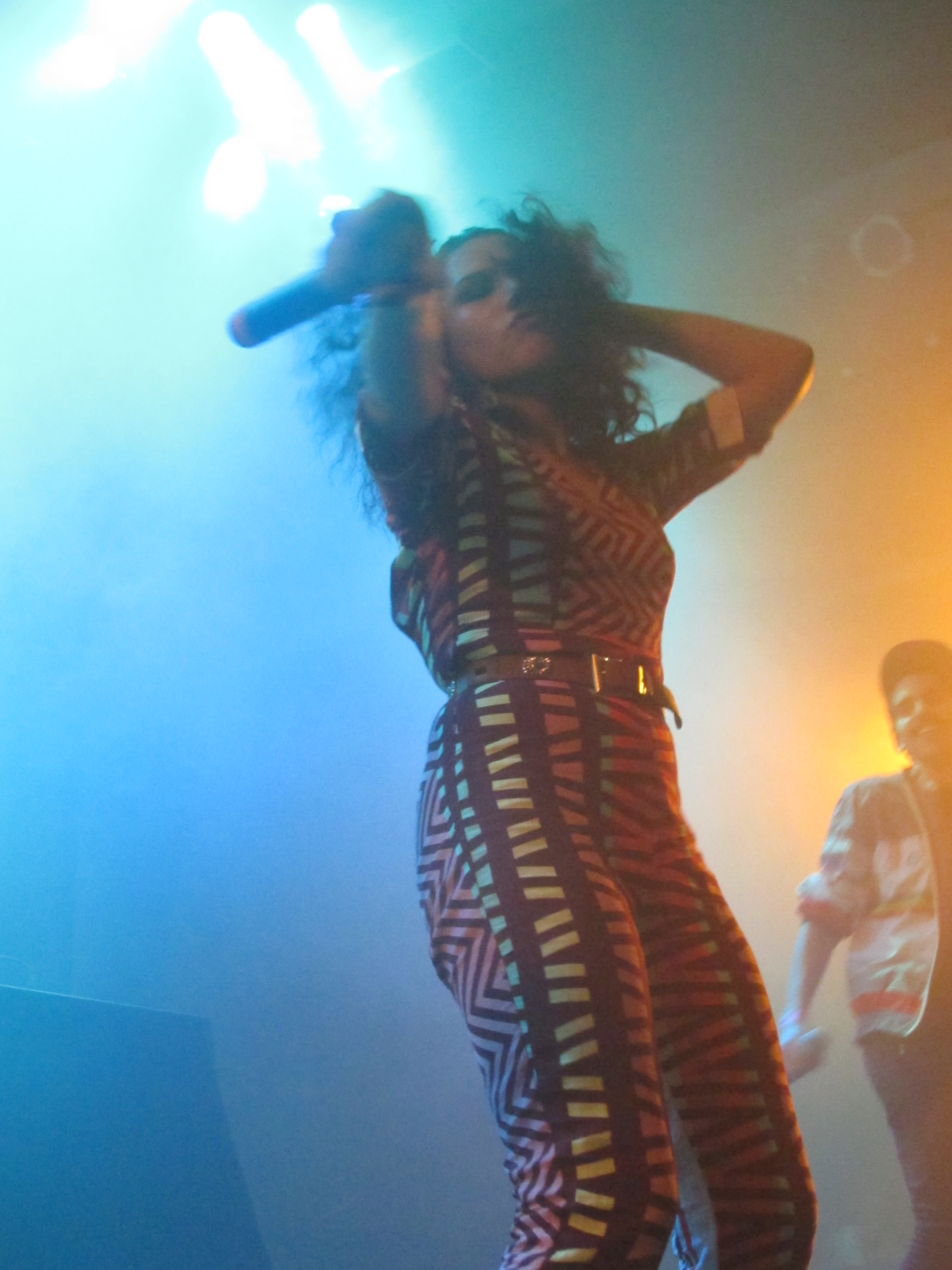 Banda Uó @ Sesc Pompeia (SP)